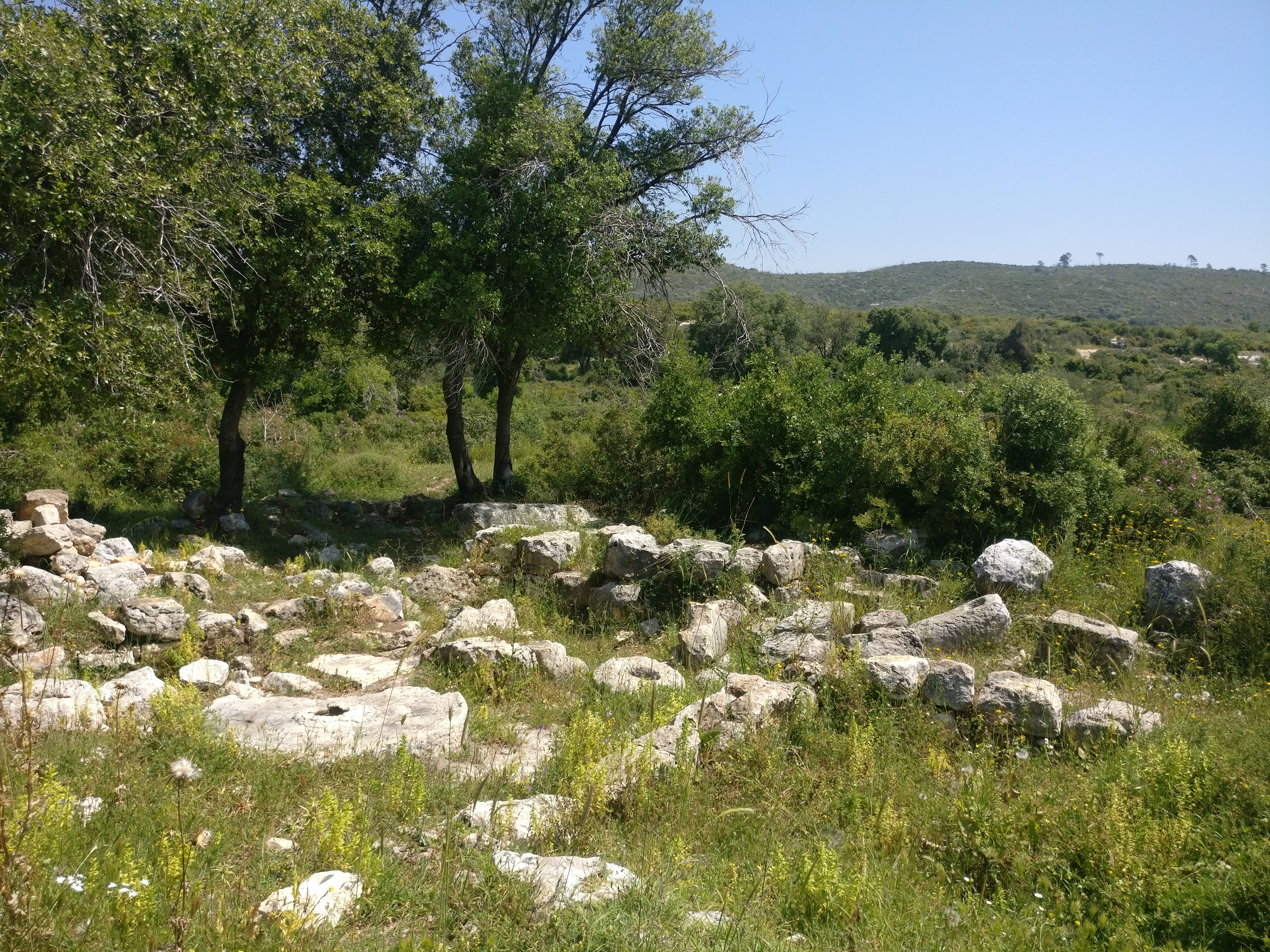 שרידי בית בד בחורבת רקית